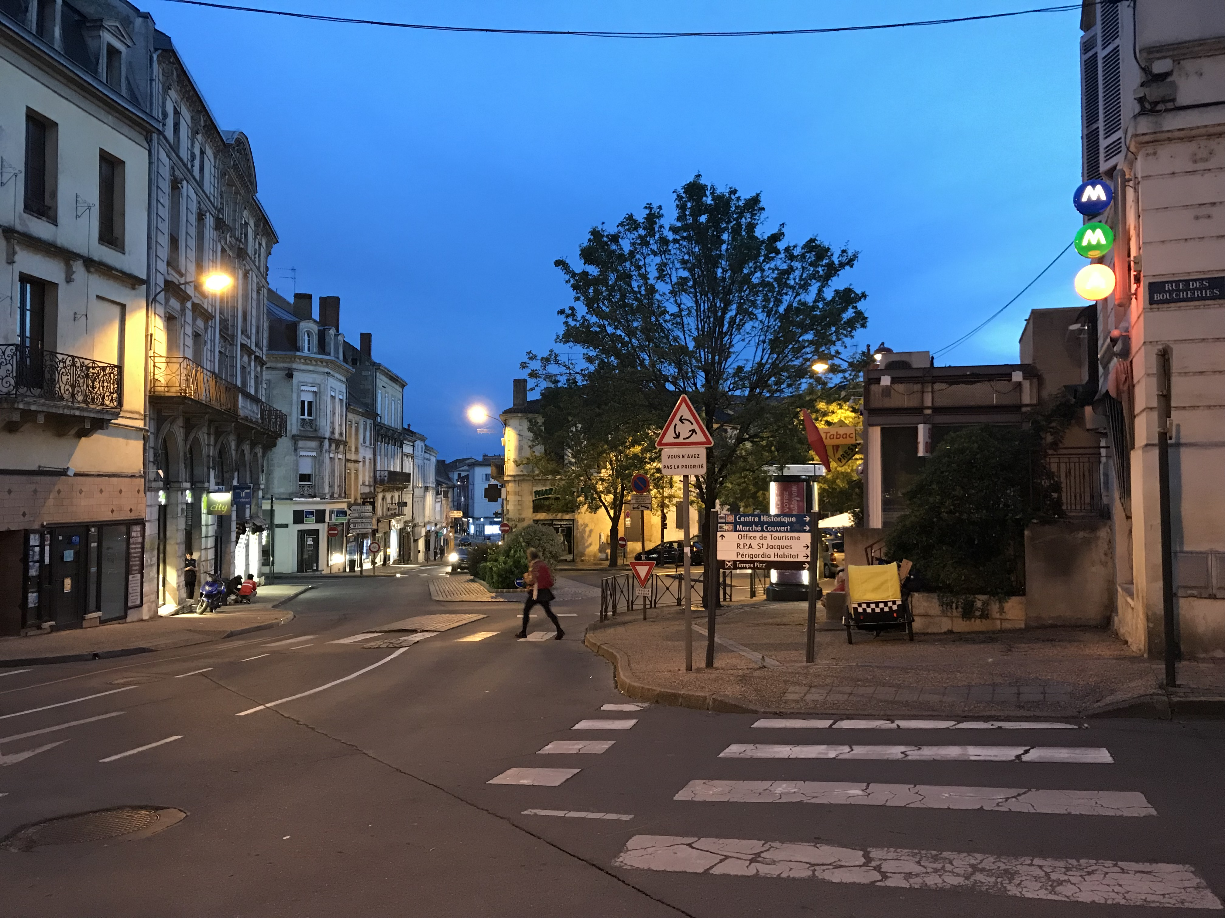 Fin soirée d'été à Bergerac